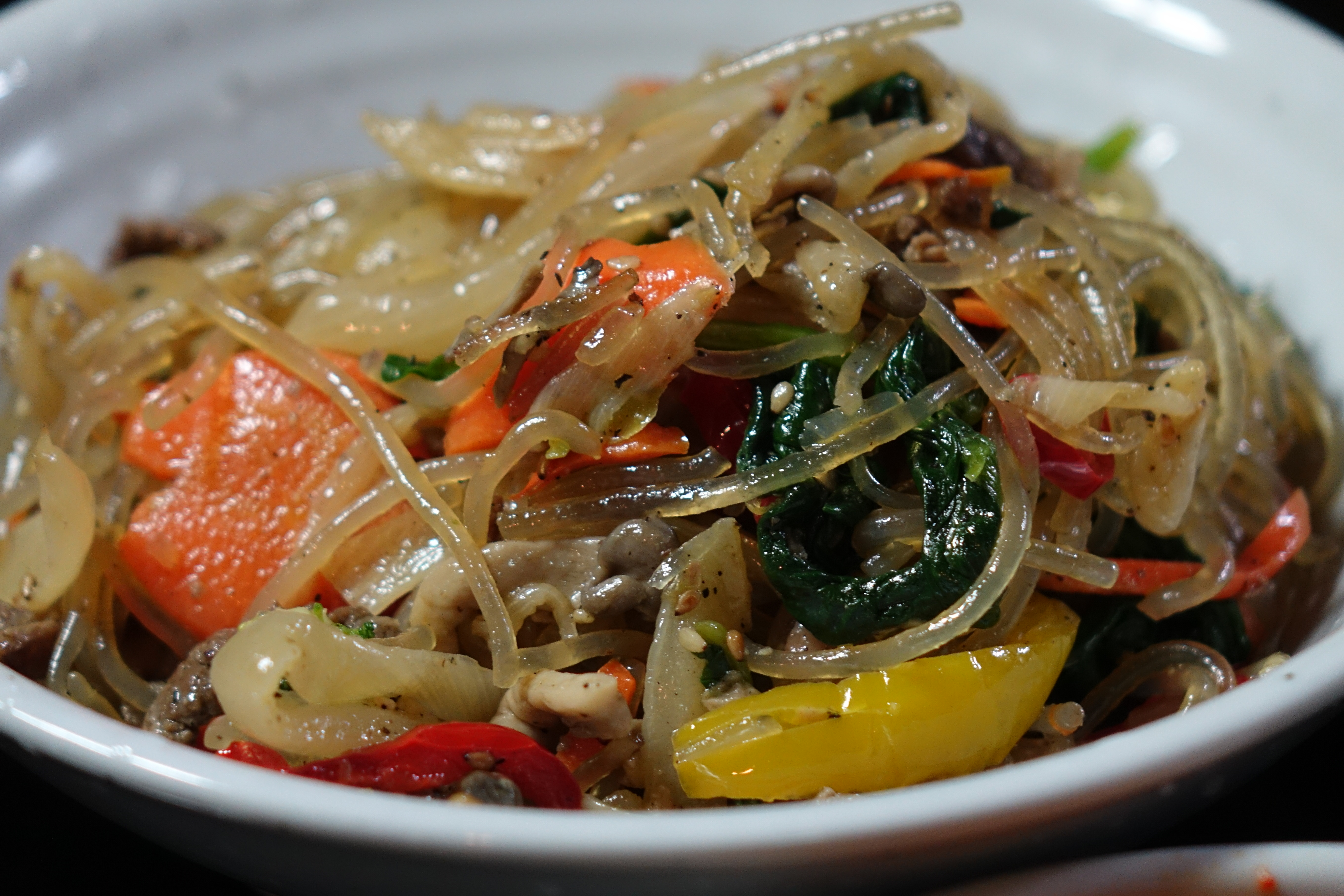 잡채 사진.